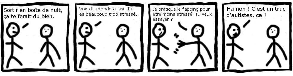 Exemple de situation où les autistes et les neurotypiques n'ont pas du tout les mêmes manières de réguler leur stress.